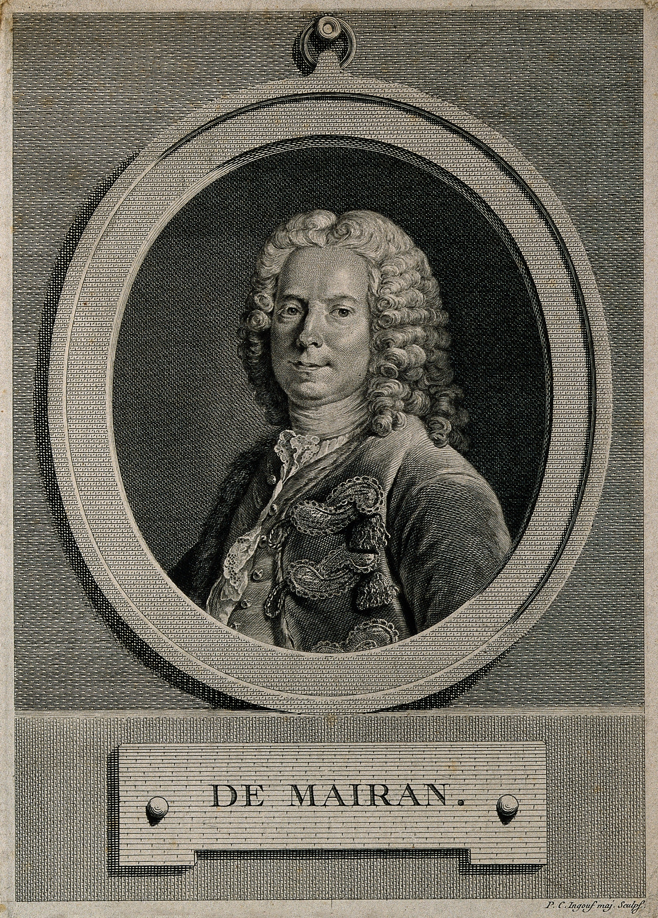 Jean-Jacques Dortous de Mairan. Line engraving by P. C. Ingouf, major, after L. Tocquet. Iconographic Collections Keywords: portrait prints; engravings; Jean-Jacques-Dortous de Mairan